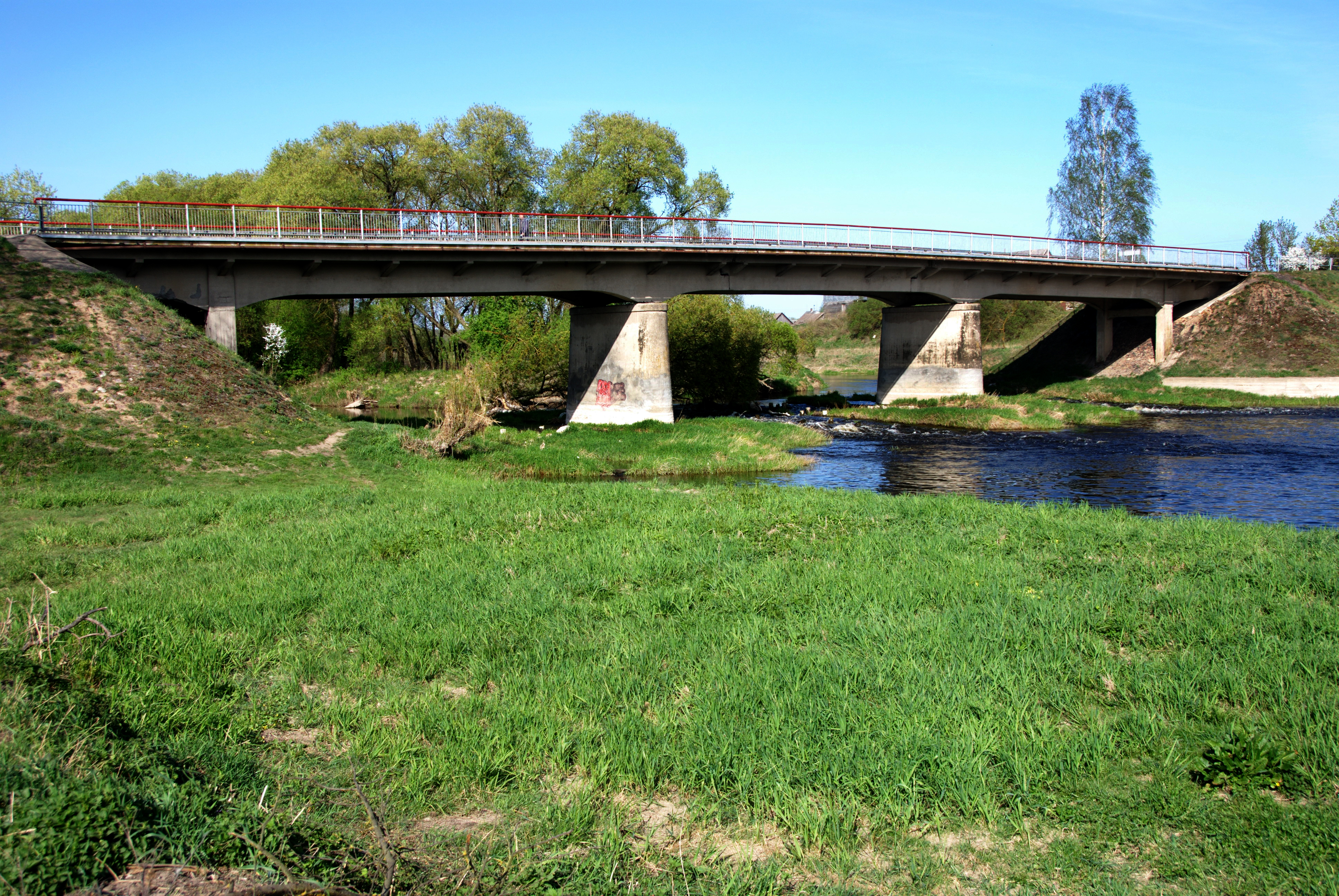 Tiltas per Nevėžį Krekenavoje